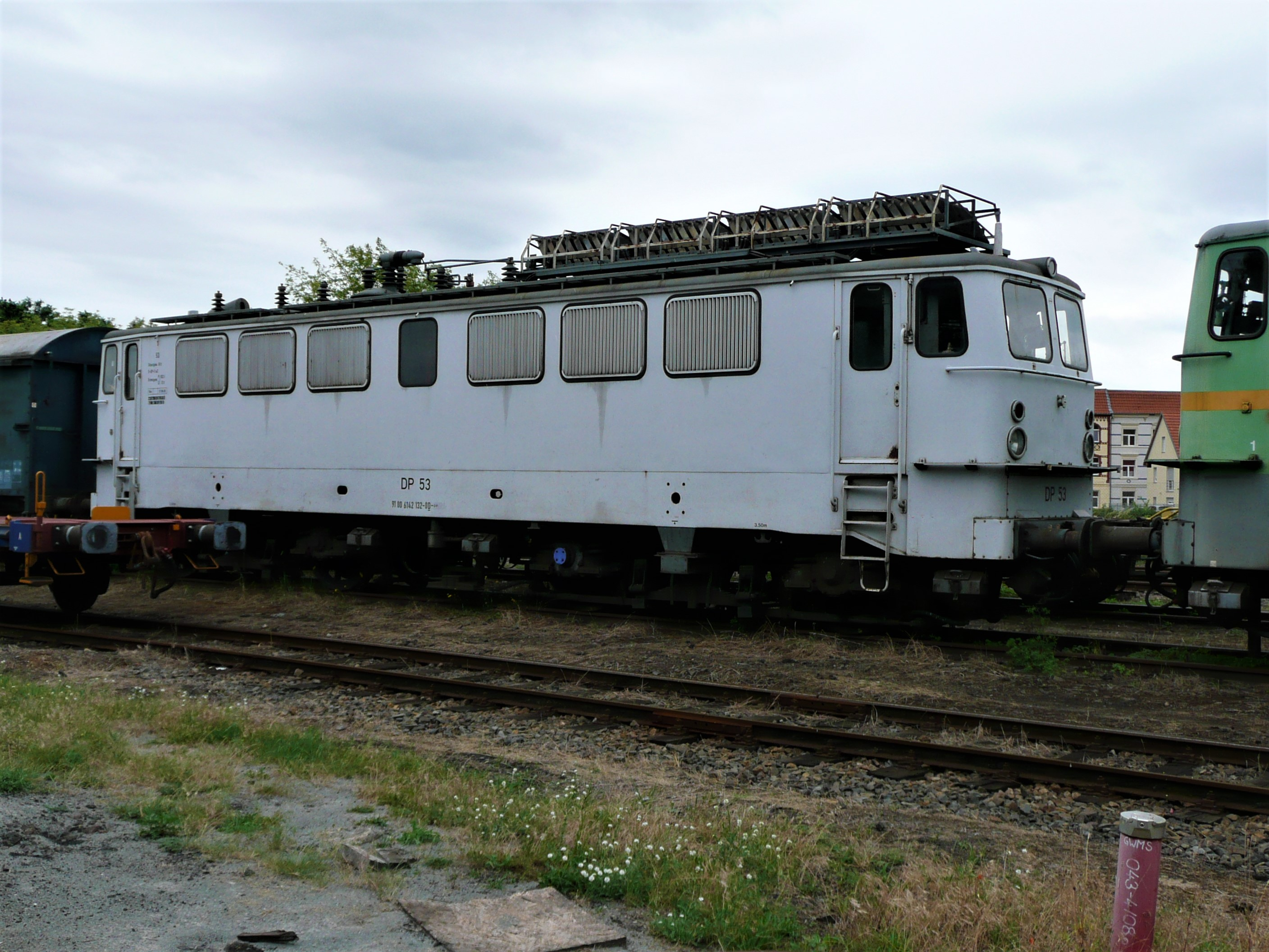 142 132 der Eisenbahn-Gesellschaft Potsdam im historischen Lokschuppen Wittenberge